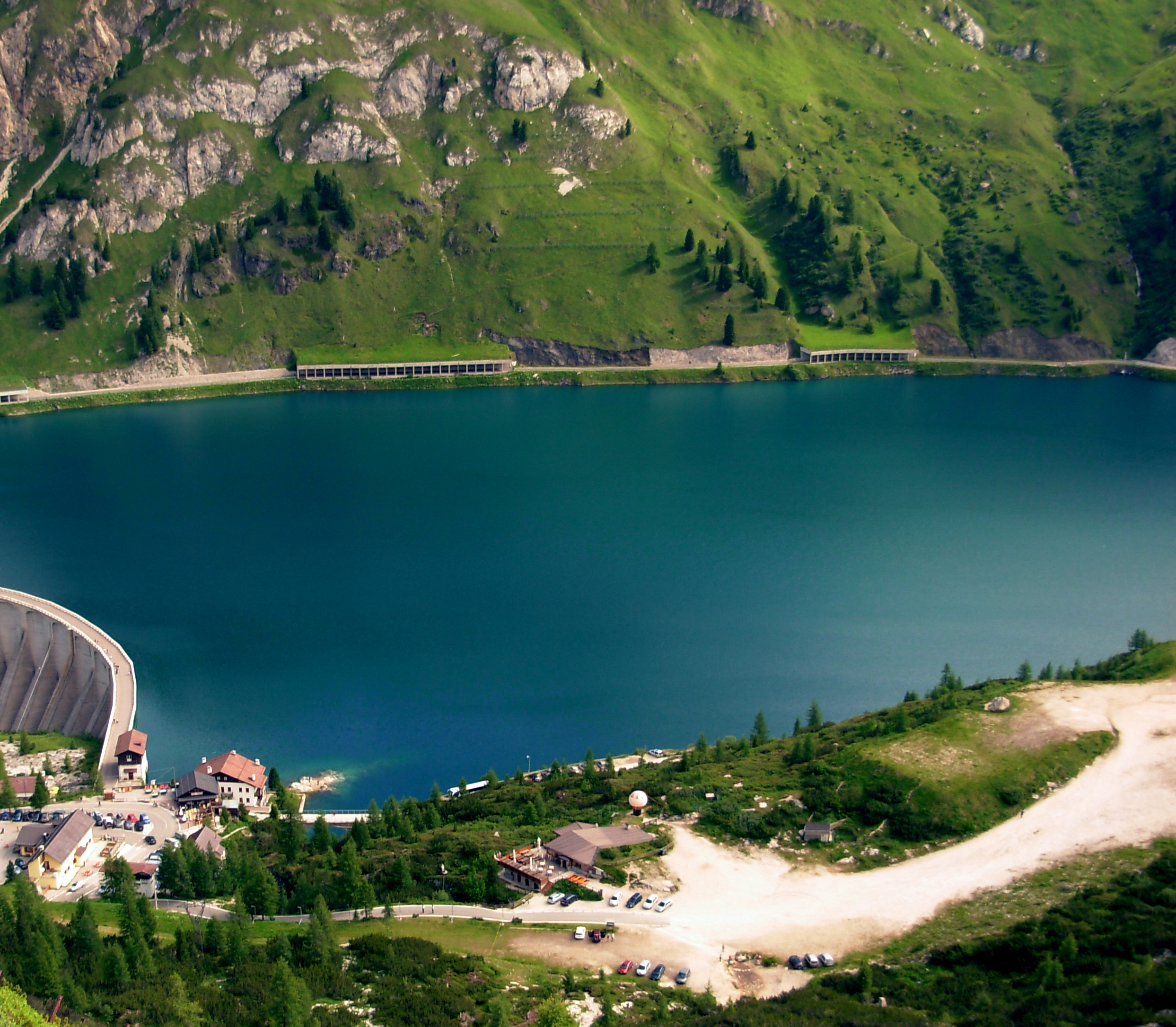 Lago di Fedaia von Süden